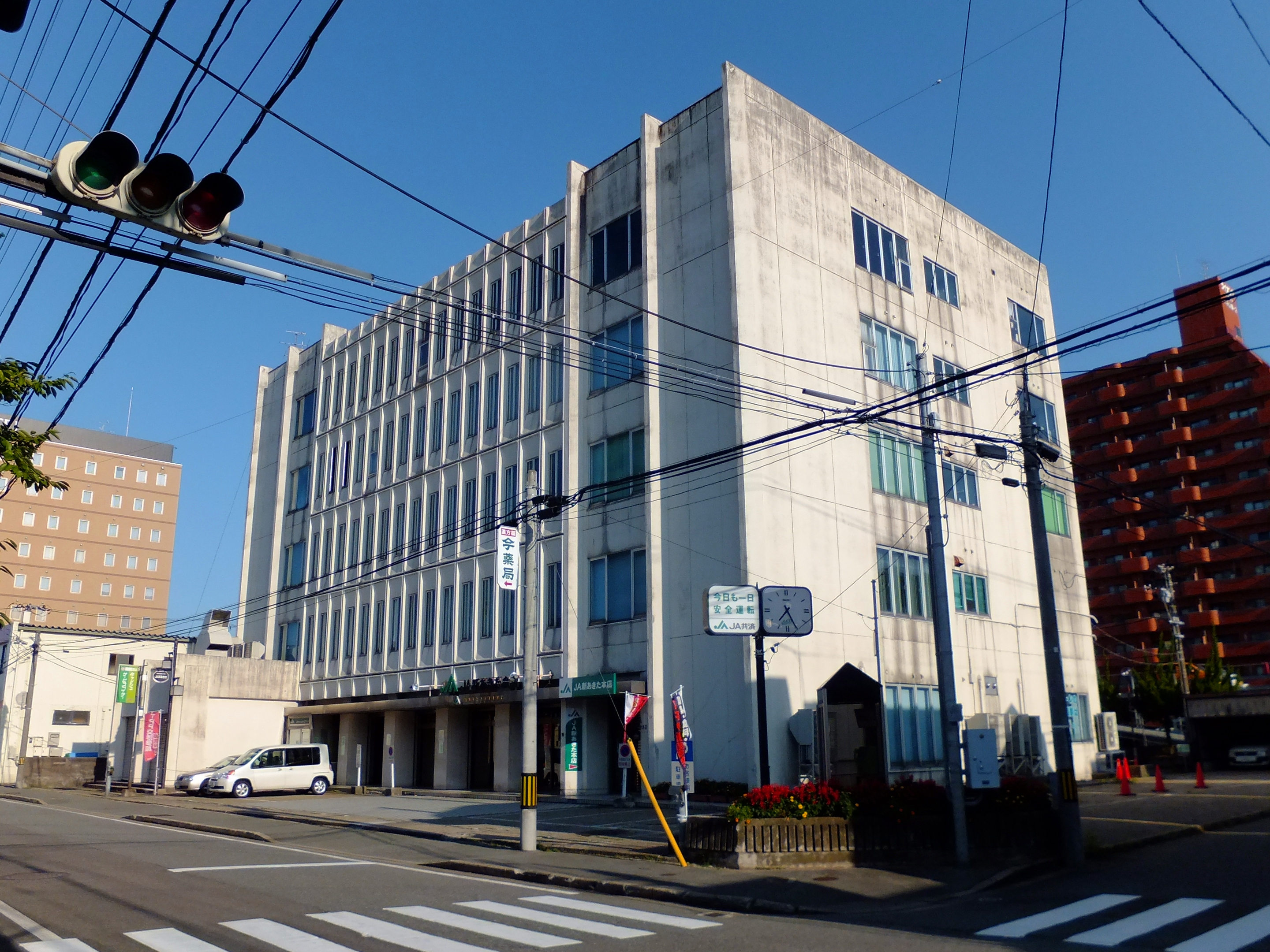 JA新あきた本店（秋田市千秋矢留町）